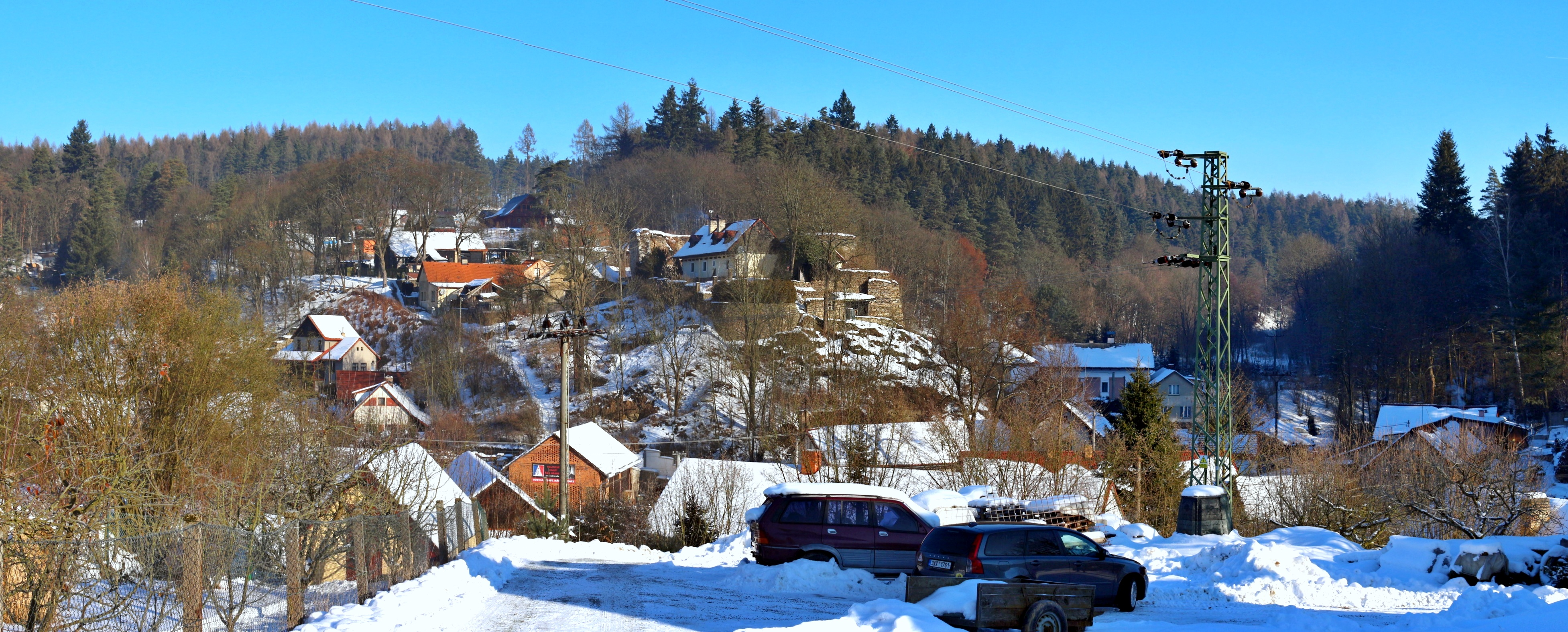 Talmberk